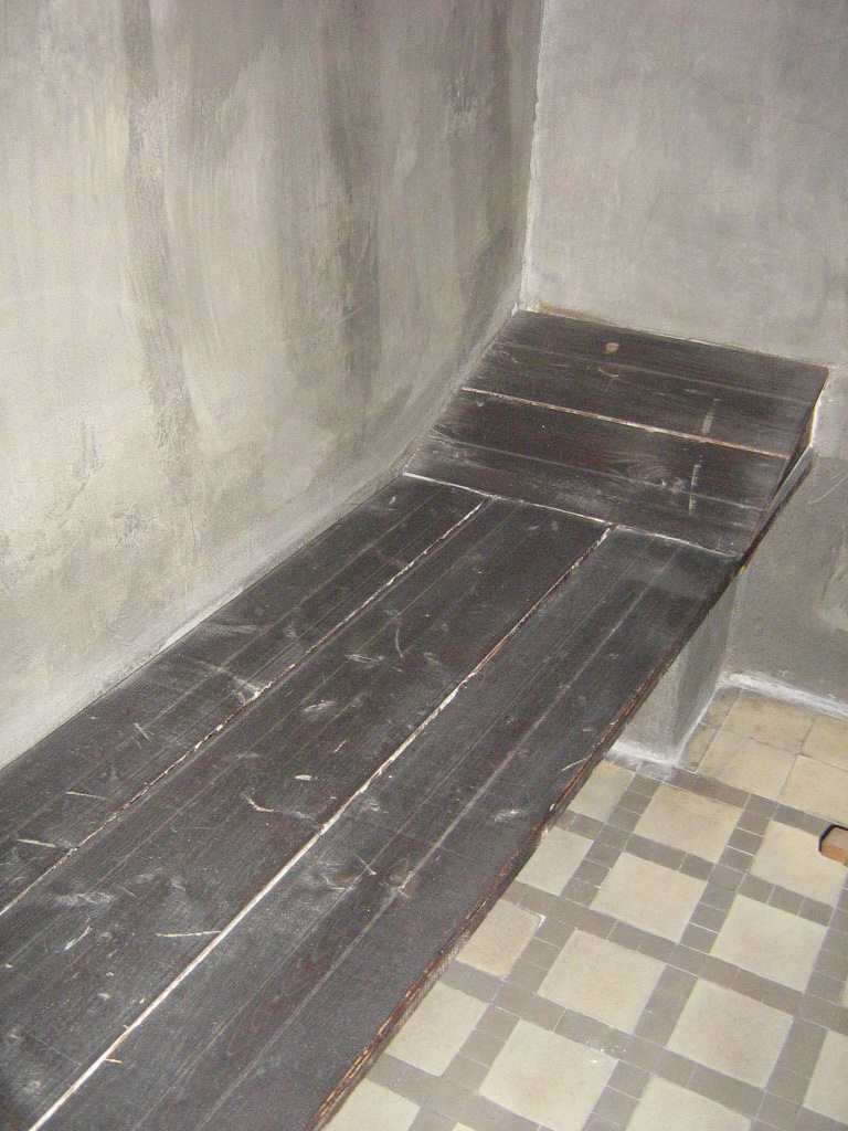 Cela v Pečkově paláci